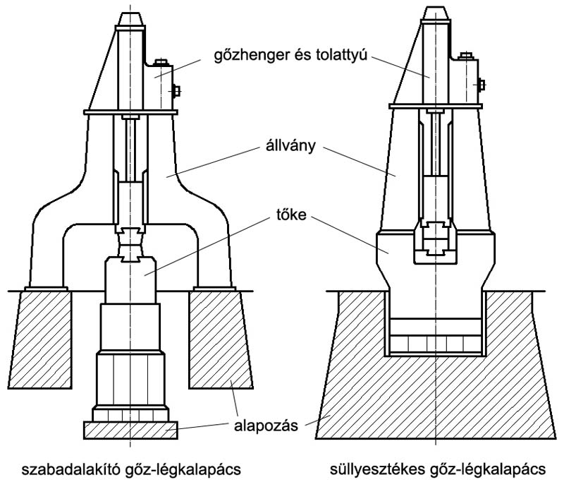 A szabadalakító és a süllyesztékes gőz-légkalapácsok alakja